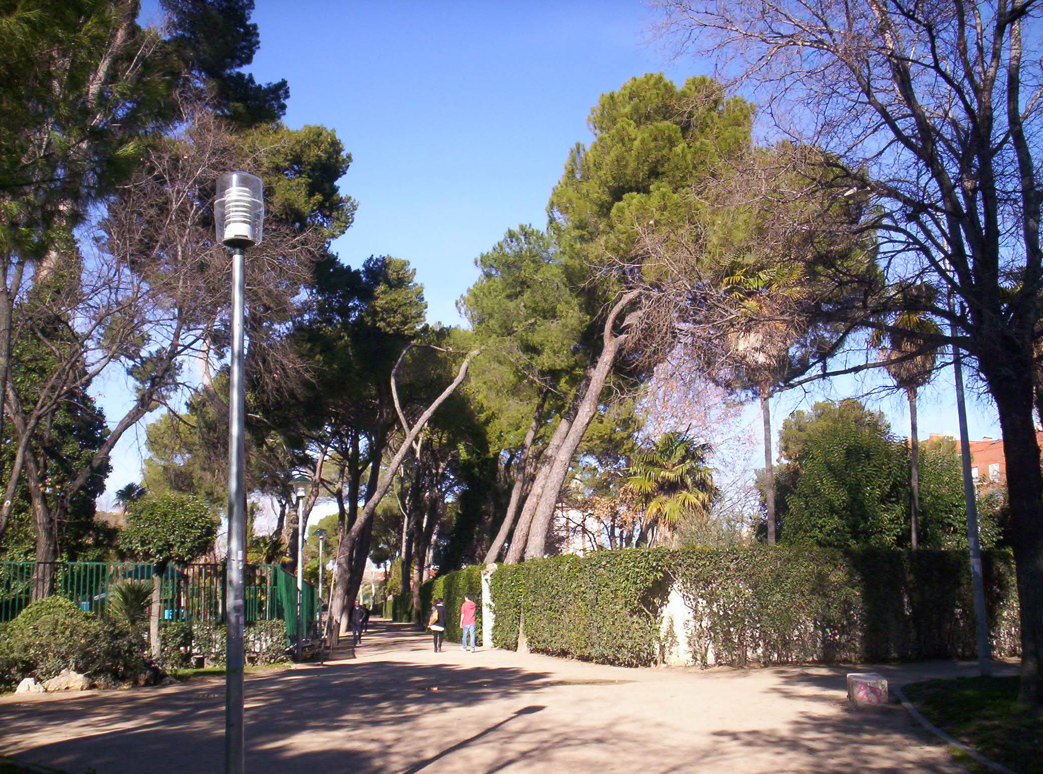 Parque O'Donnnell en Alcalá de Henares. A la izquierda la verja del parque infantil, a la derecha el muro de la piscina municipal.